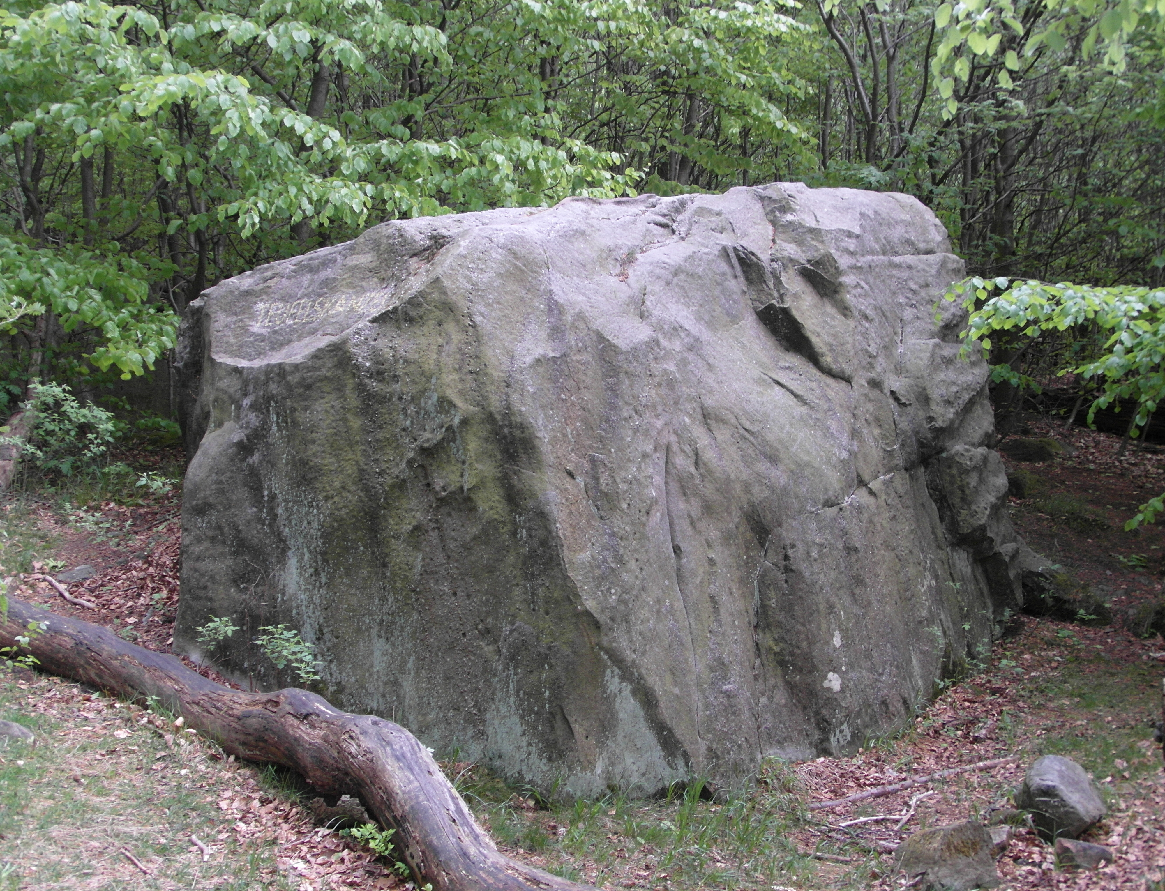 Naturdenkmal ND-HM 174 Teufelskanzel im Deister. Bei Nienstedt, Stadt Bad Münder, Landkreis Hameln. Westansicht.